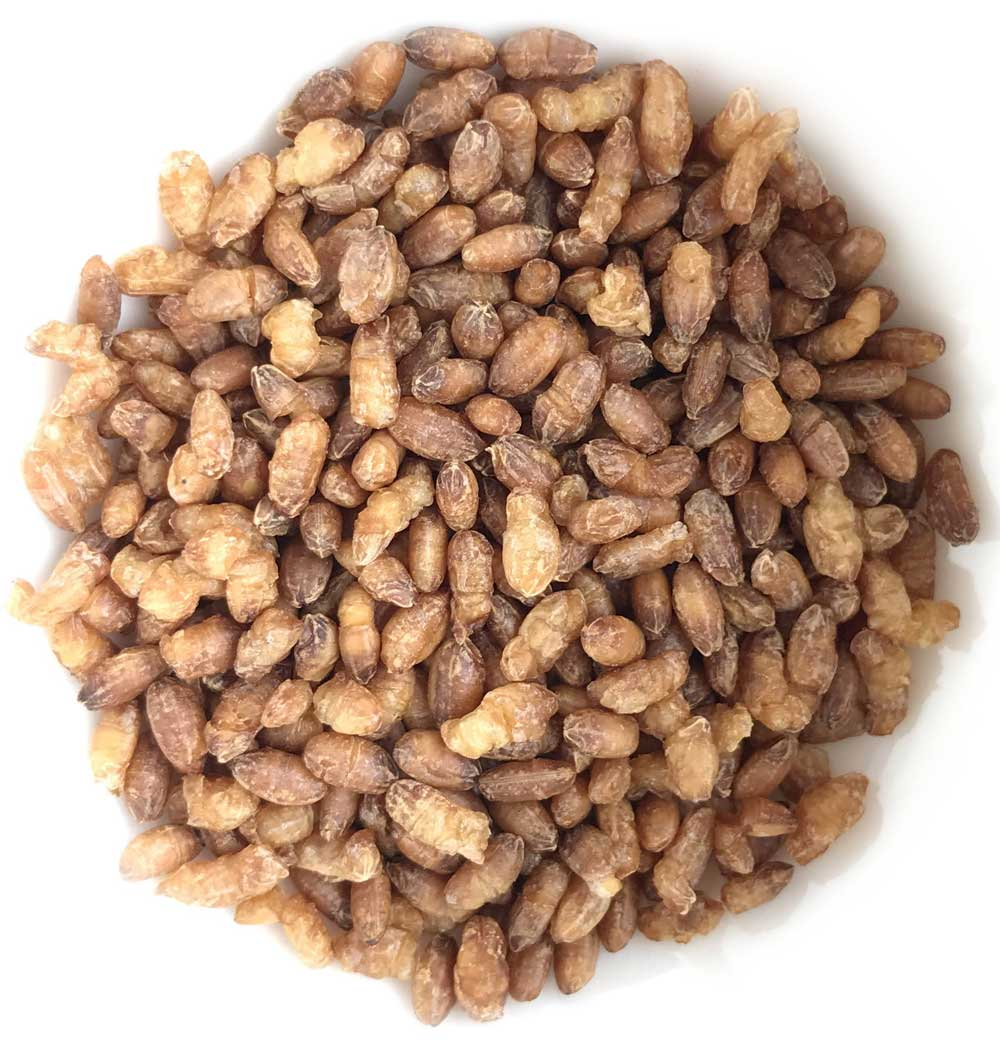 白米を焙煎した加工食品